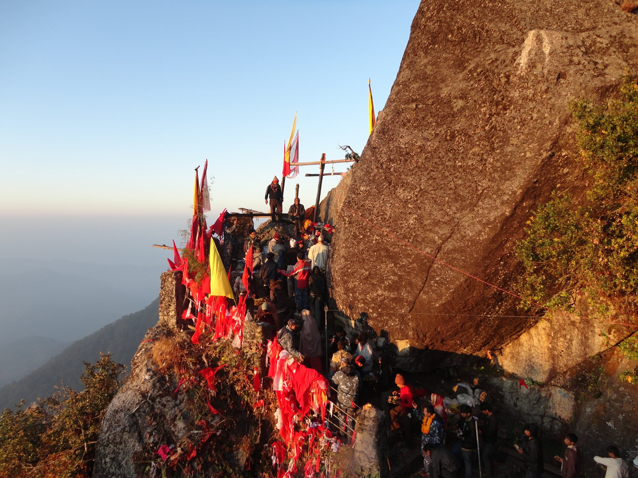 नेपाल भाषा: Kedaar